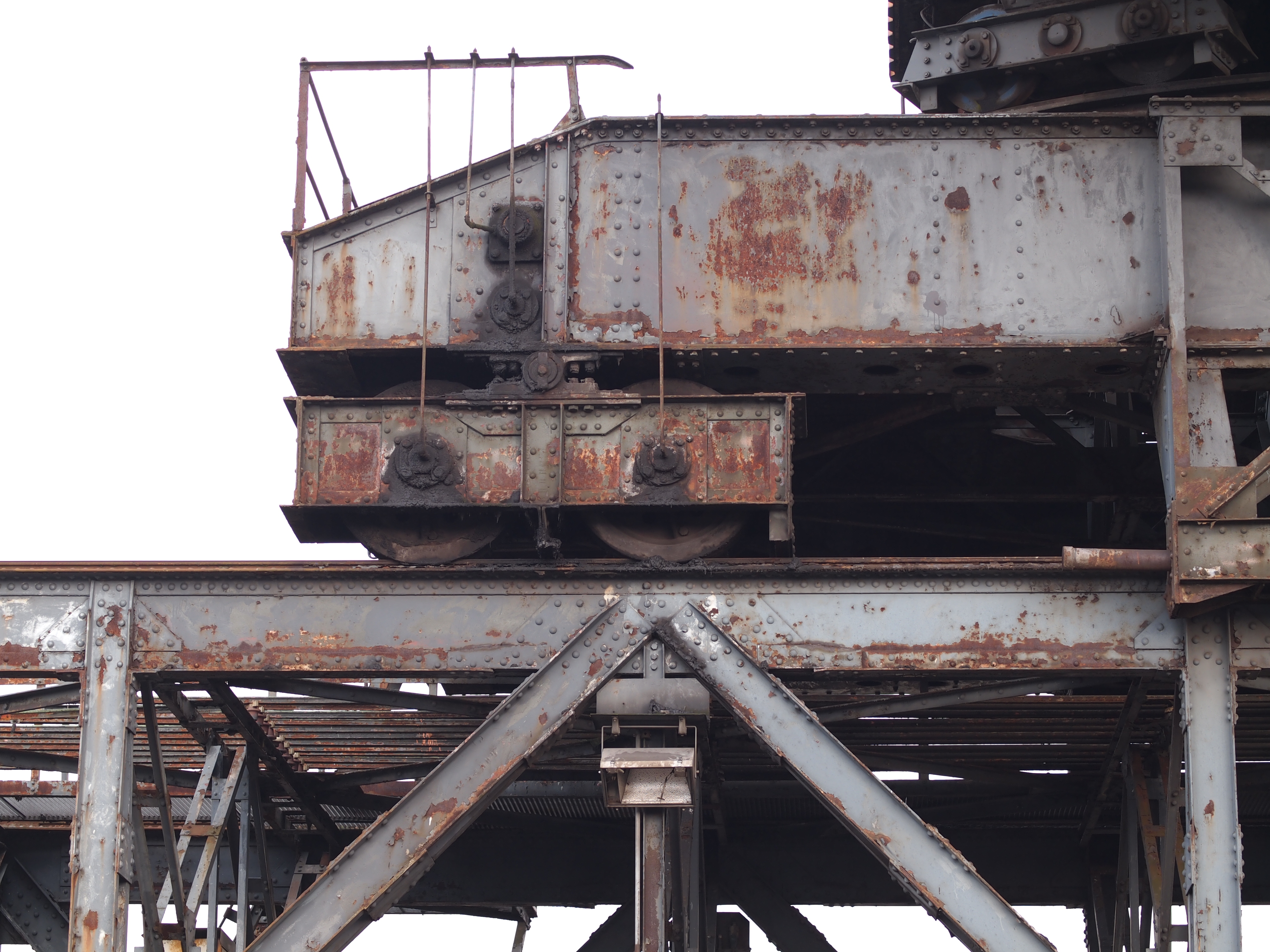 Ehemaliger Hafenkran eines früheren Hafenbeckens im Hafen Herne West am Rhein-Herne-Kanal, Denkmal in Herne-Wanne, Am Westhafen, Detail